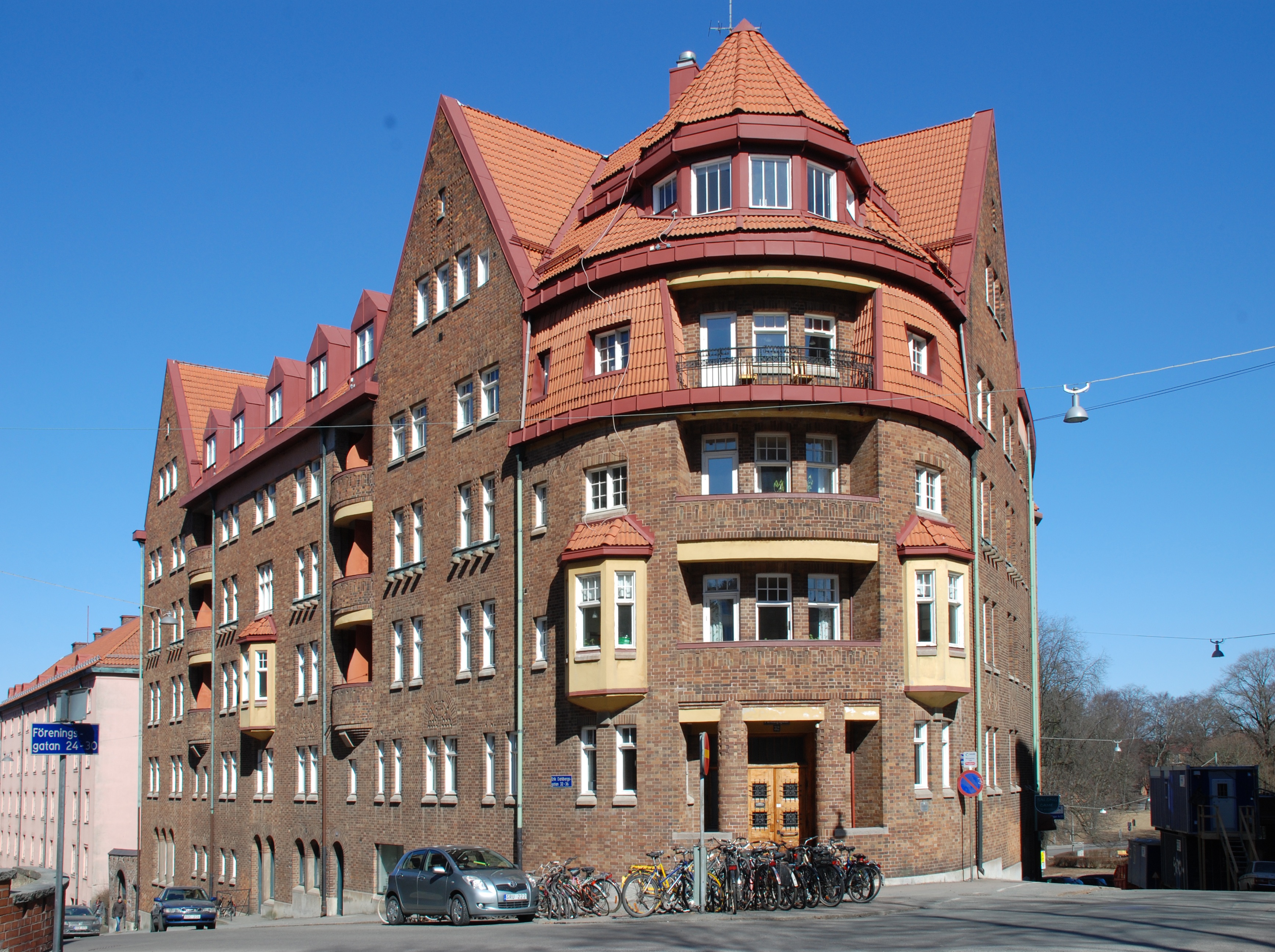 Föreningsgatan 32 i Göteborg, studenthemmet Jeriko. Byggnaden uppförd 1911-1913 av Göteborgs Hemtrefnad AB. Ritat av Hans och Björner Hedlund. Studentbostäder sedan 1972. (Källa: Skylt på byggnaden.)